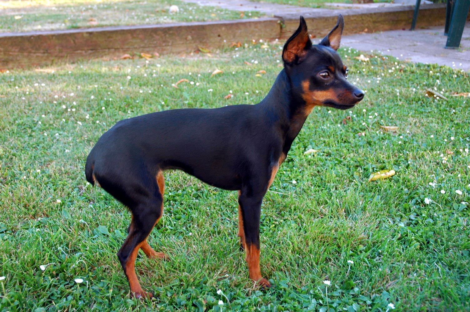 Pražský Krysařík dog, adult